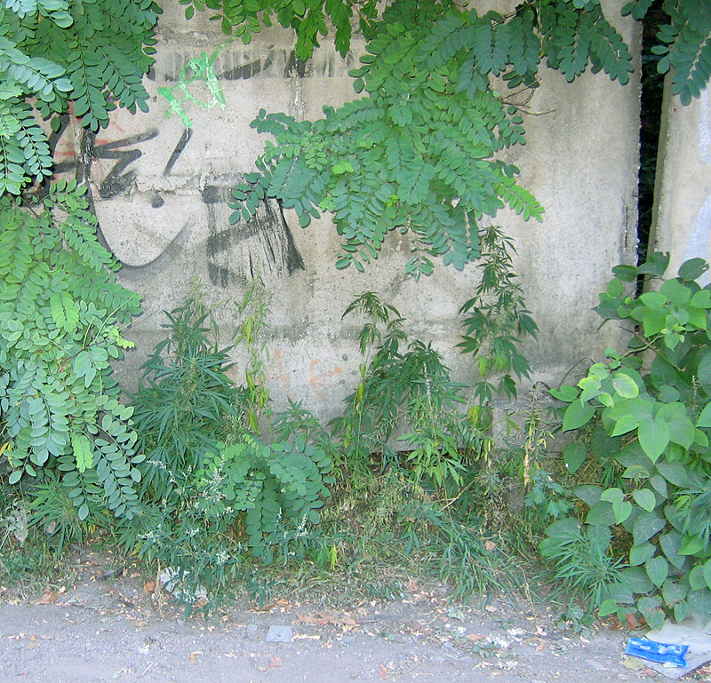 Laukinės kanapės; Kauno centras, Kęstučio gatvė; 2005 metai, ruduo.